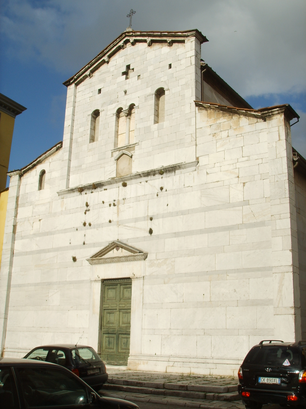 La facciata del Sant'Alessandro mostra con evidenza le due principali fasi costruttive: la prima si distingue per le grandi lastre perfettamente spianate e connesse, disposte alla maniera antica in filari alti e bassi, comprende il portale classicheggiante e arriva fino alla cornice intermedia; la seconda è caratterizzata invece da pietre molto più piccole, disposte senza un ordine particolare, e comprende tutta la parte superiore, con la bifora, le monofore e la cornice terminale sorretta da modiglioni fogliati e teste di leone, di sapore pienamente romanico. Da notare come nella parte più antica il paramento a filari alternati sia disposto in modo da proiettare sulla superficie le altezze del portale cosicché il piano di facciata sembra generarsi geometricamente dal portale stesso, secondo modalità che non hanno riscontri nell'architettura romanica. Si noti anche la sottile distinzione introdotta tra i filari più bassi: mentre quelli di colore bianco hanno solo funzione di partizione (ad esempio ai lati degli stipiti), quelli grigi proiettano sulla superficie i nodi strutturali (capitelli, vertice del frontone, cornice intermedia). La fascia grigia che corre al di sopra del portale e che oggi sembra non avere alcuna funzione proiettiva in origine collegava le cornici terminali dei sensibilmente più bassi risalti angolari.